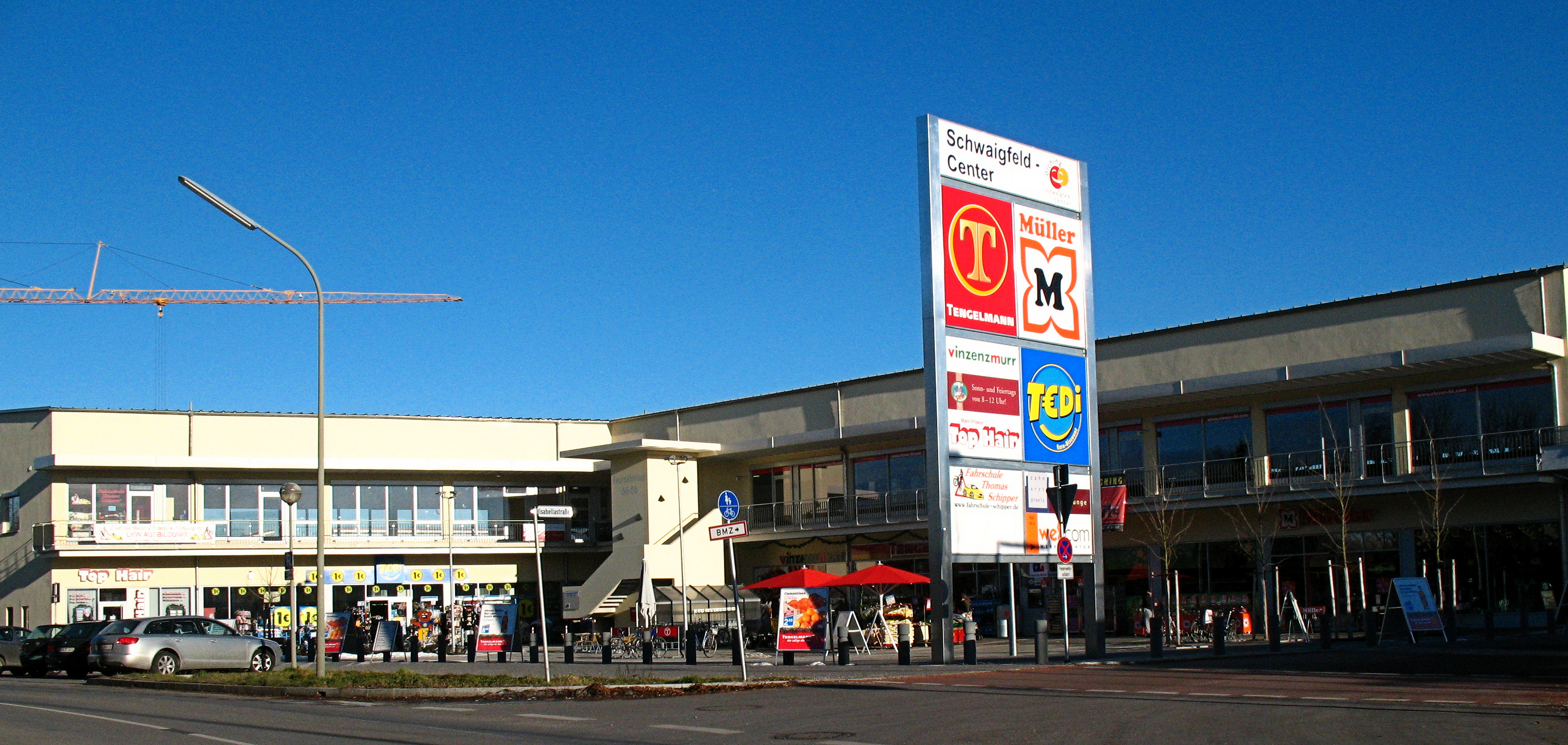 Deutschland, Bayern, Landkreis Fürstenfeldbruck, Gemeinde Olching, Einkaufszentrum im Schwaigfeld